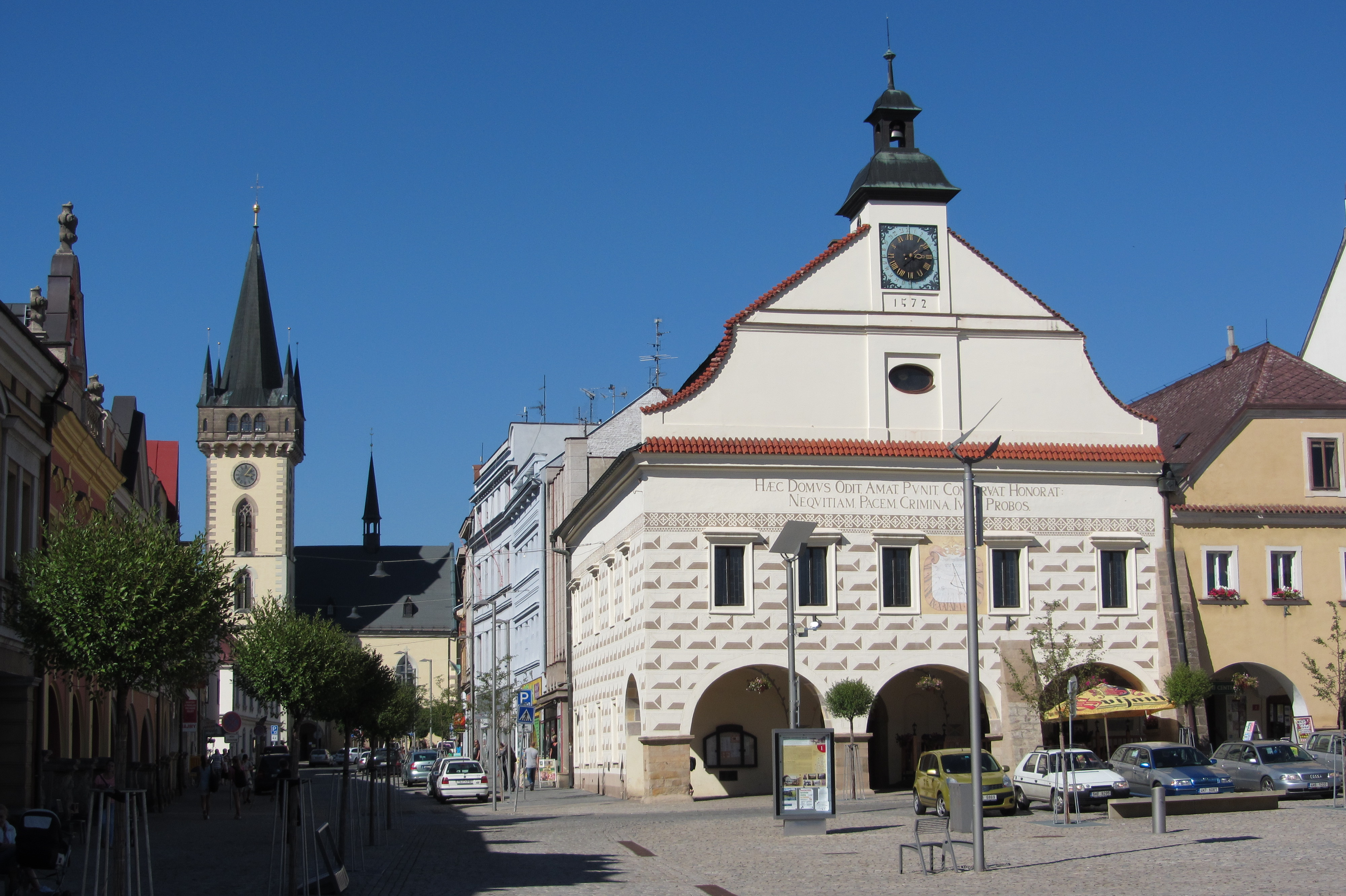 Kostel a radnice z náměstí T.G.M. ve Dvoře Králové nad Labem